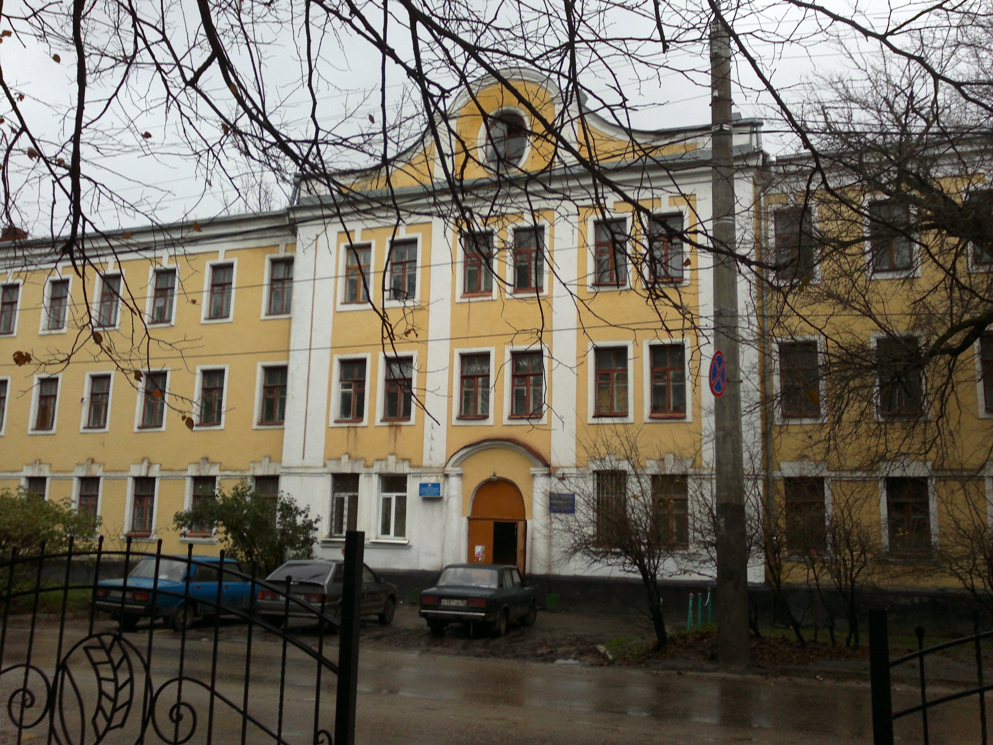 общежитие №2 ВГАУ 31 октября 2012 года